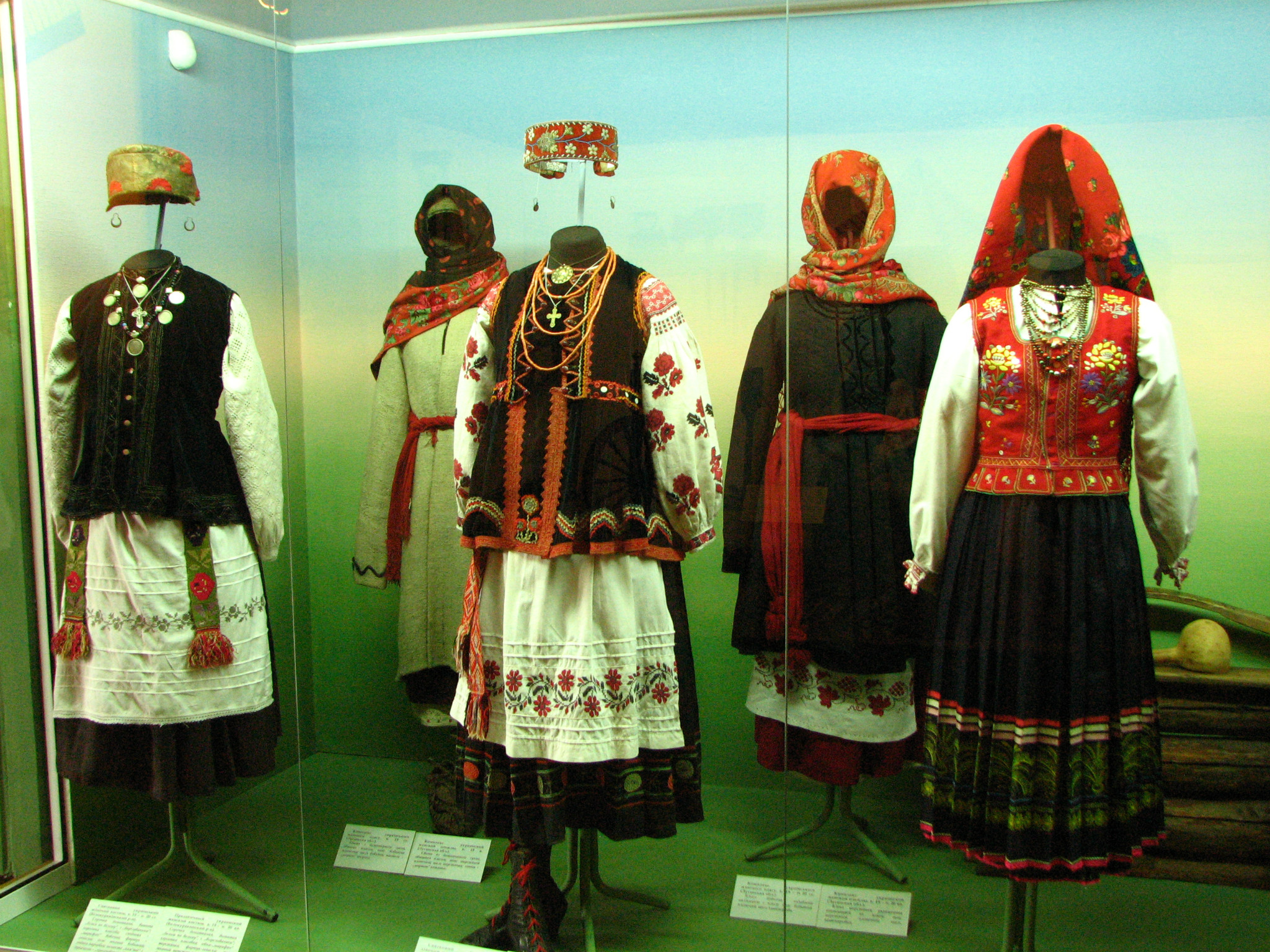 Жіноче народнє вбрання в залях луганського краєзнавчого музею.